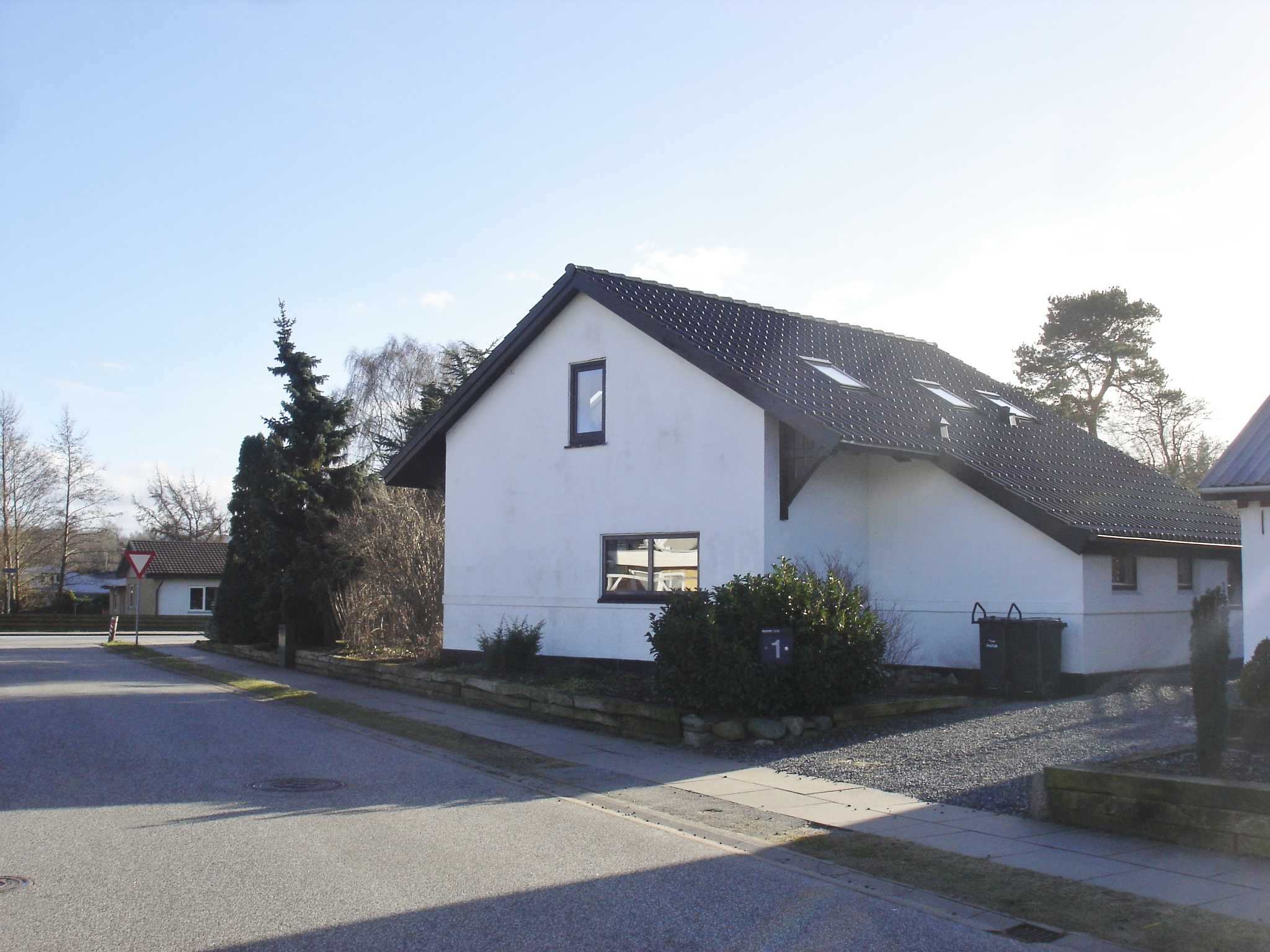 Elling Station fra N